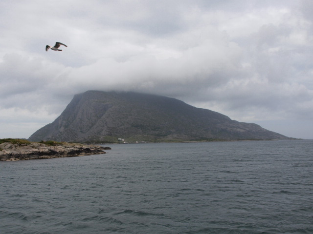 Storebatalden,Flora,Noreg